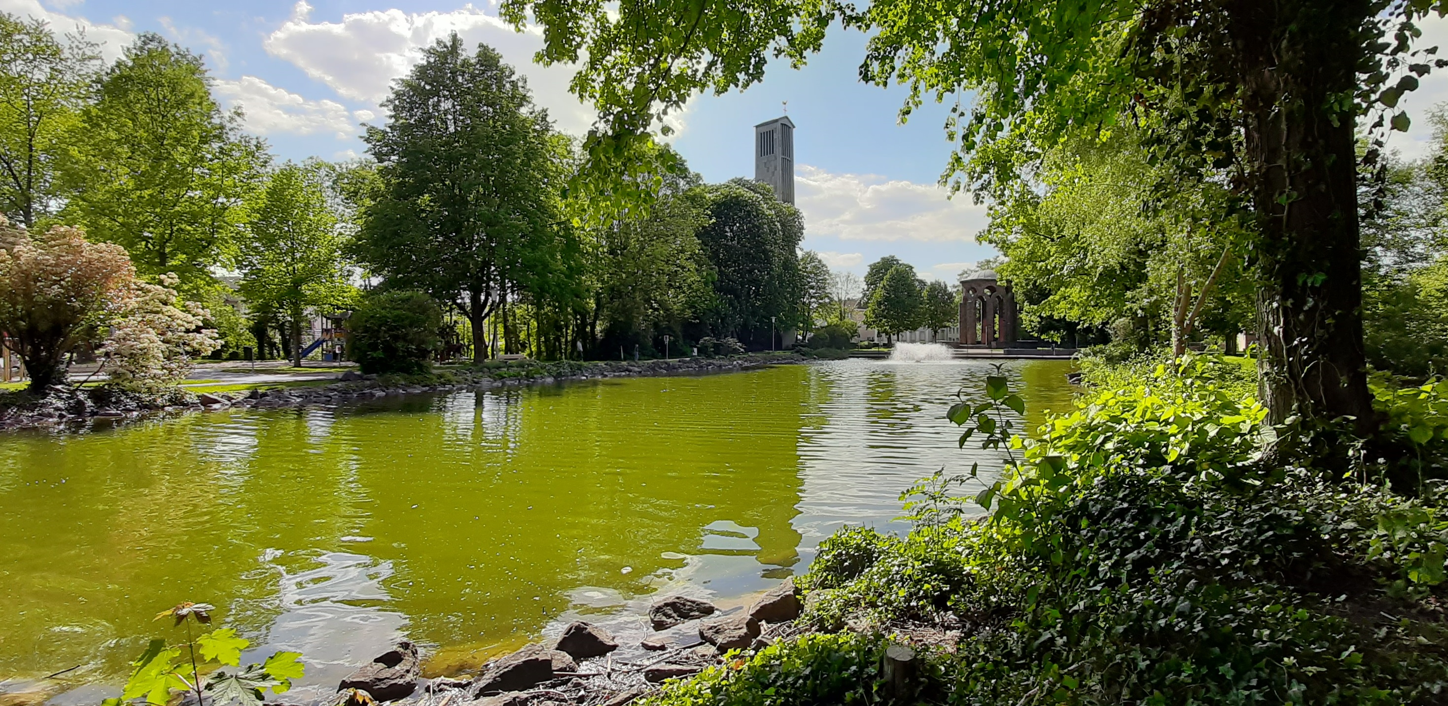 Westteich Beckum